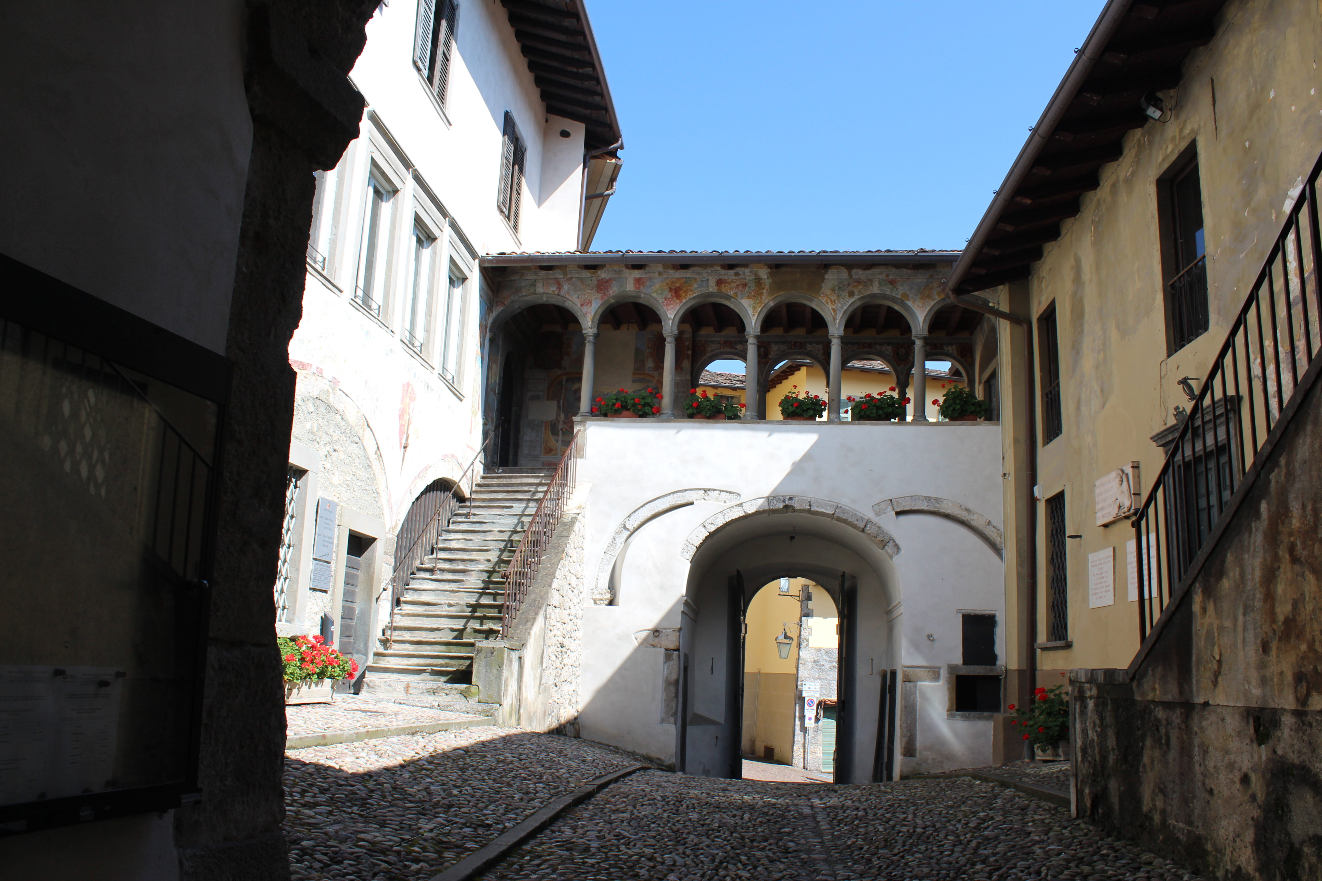 Palazzo Comunale (ala nord-sud e cortile con vista da Piazza Orologio) This is a photo of a monument which is part of cultural heritage of Italy.